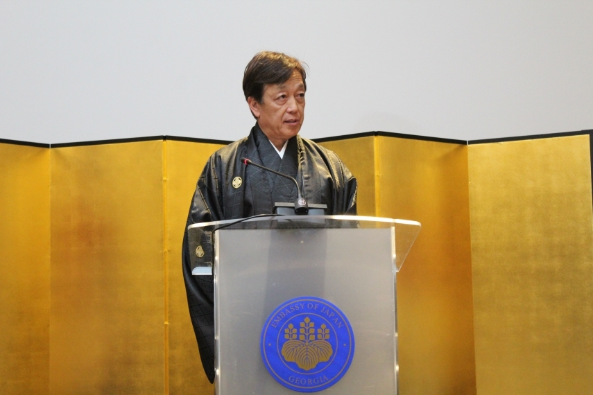 駐ジョージア日本国特命全権大使の上原忠春